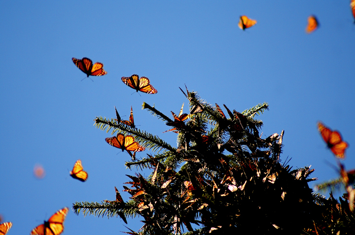 Santuario de la mariposa monarca en Edomex